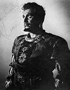 Tenore drammatico cileno